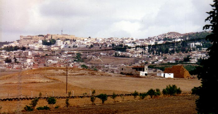 Blick auf Le Kef (El Kef) mit Kashbah